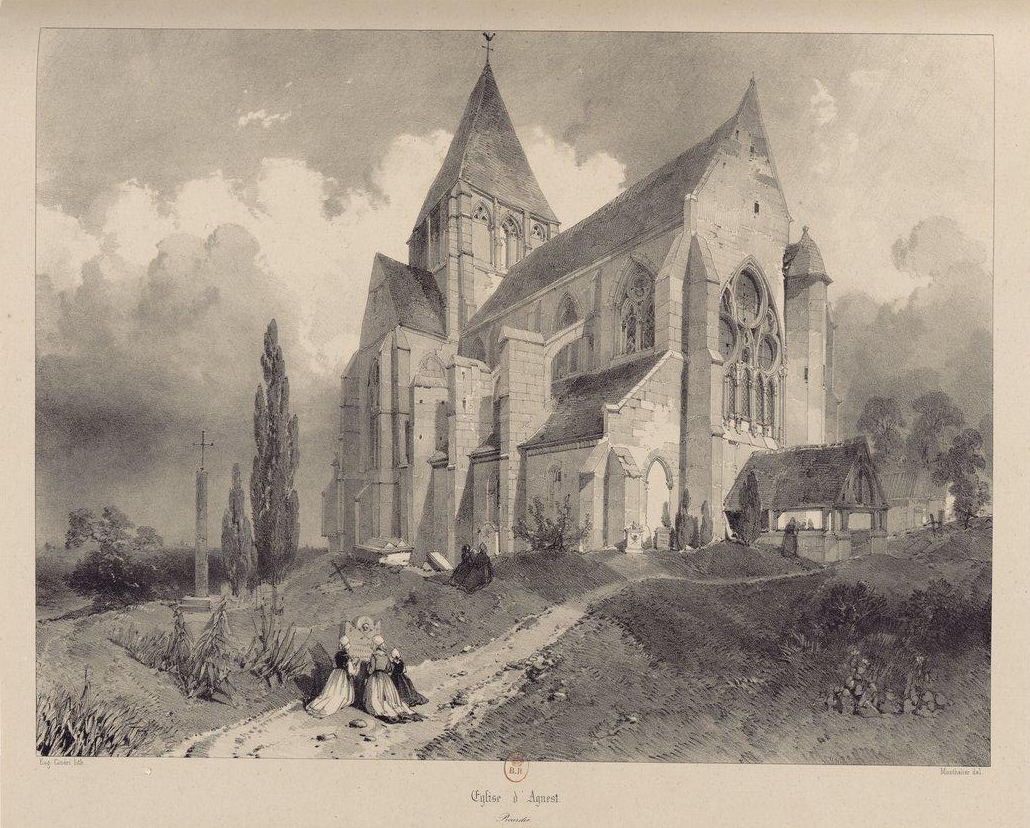 Vue de l'église Saint-Léger d'Agnetz depuis le nord-ouest, avec l'ancien porche.